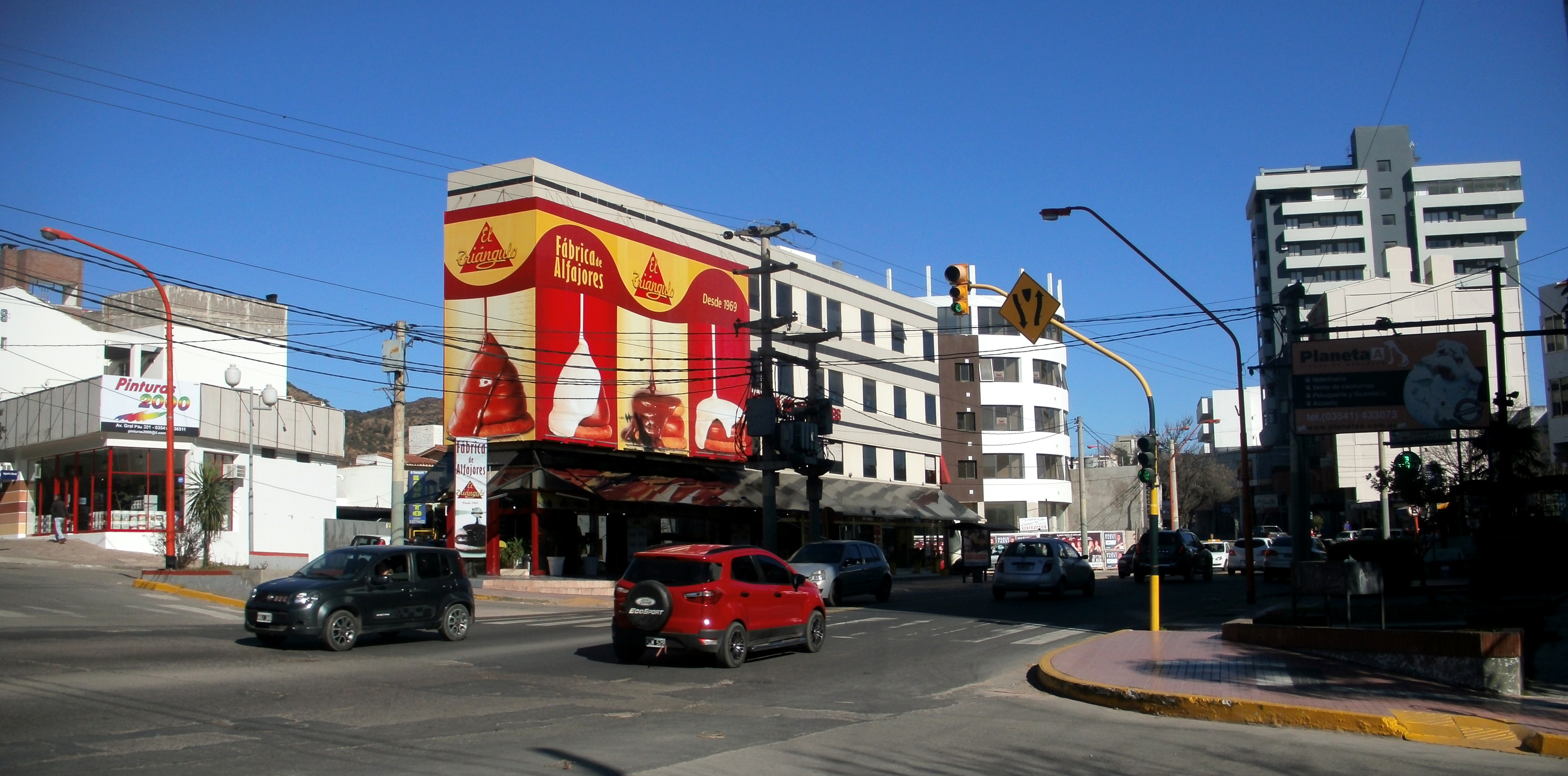 Empresa dedicada a la fabricación artesanal de alfajores, uno de los atractivos gastronómicos del lugar.